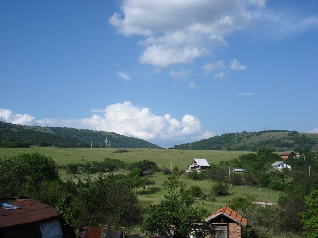 Изглед от Беледие хан